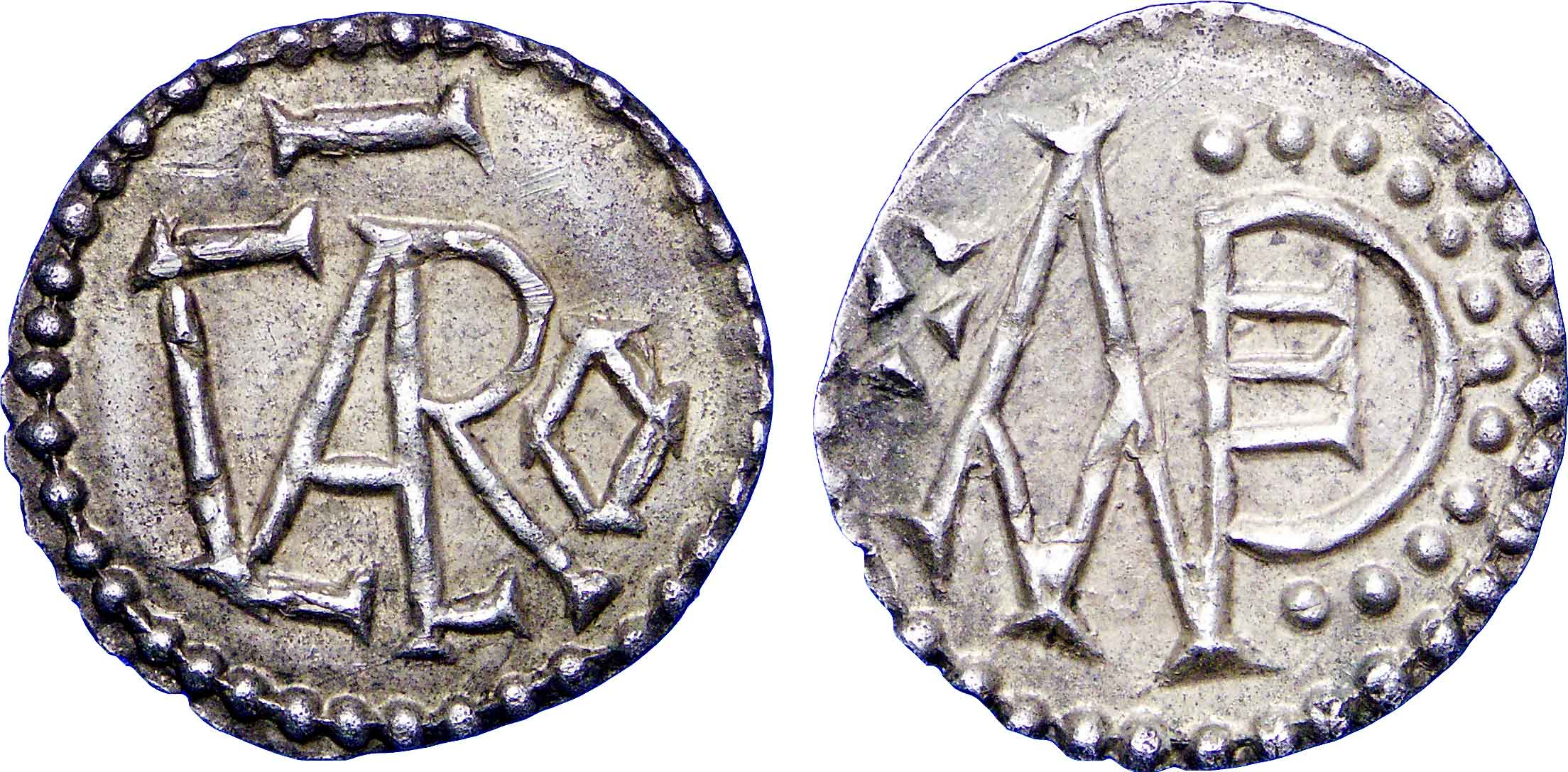 Nom de l'atelier/ville : Angers Métal : argent Diamètre : 18mm Axe des coins : 9h. Poids : 1,22g. Degré de rareté : R3 Titulature avers : CARO. Description avers : sous un trait. Traduction avers : (Carloman). Description revers : Monogramme ANDE accosté à gauche d’une croix, à droite d’un groupe de douze points formant un demi-cercle. Traduction revers : (Angers).